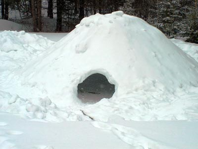 Quinzy vu de l'extérieur.